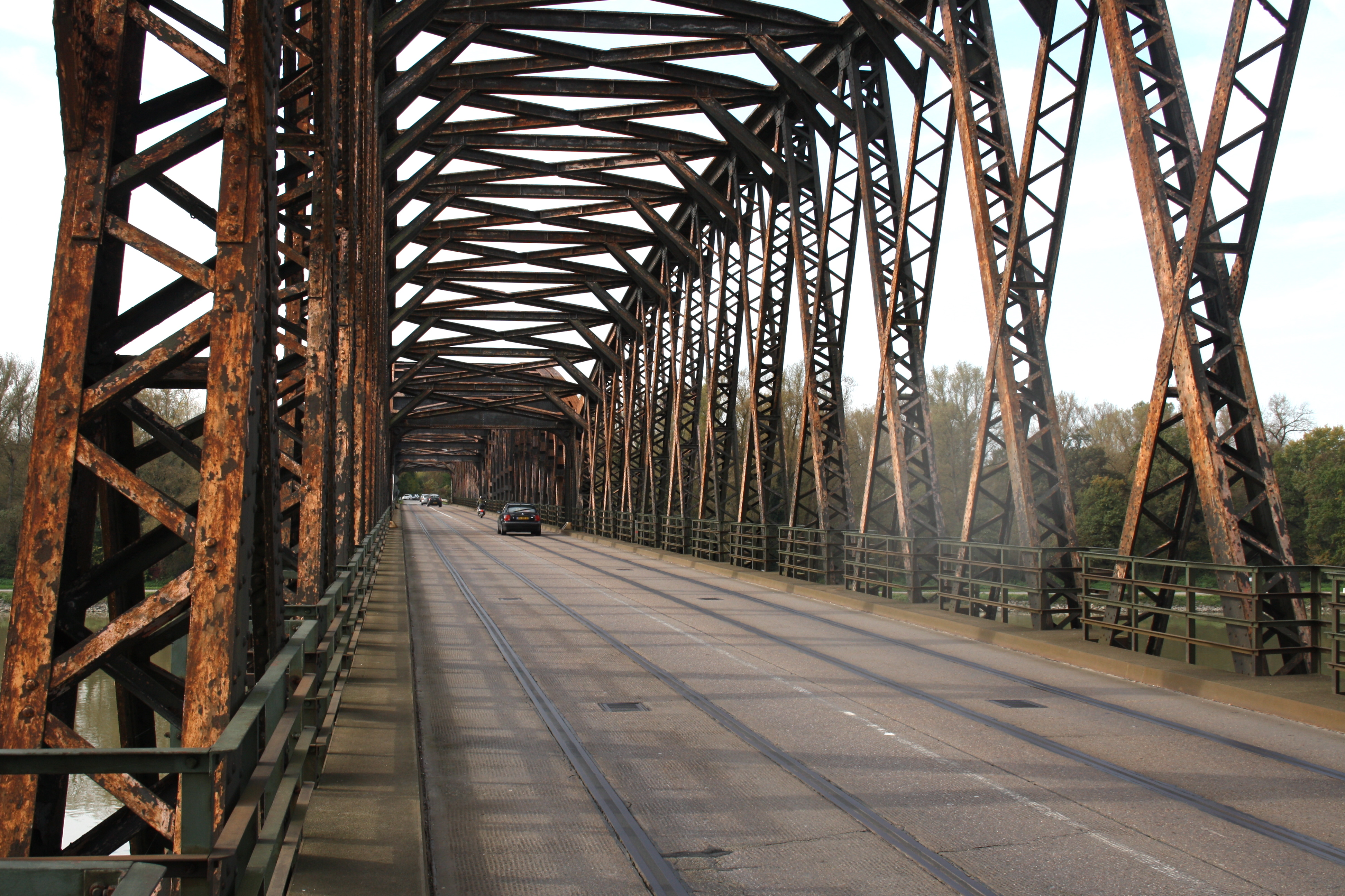 Rheinbrücke Wintersdorf westlicher Abschnitt